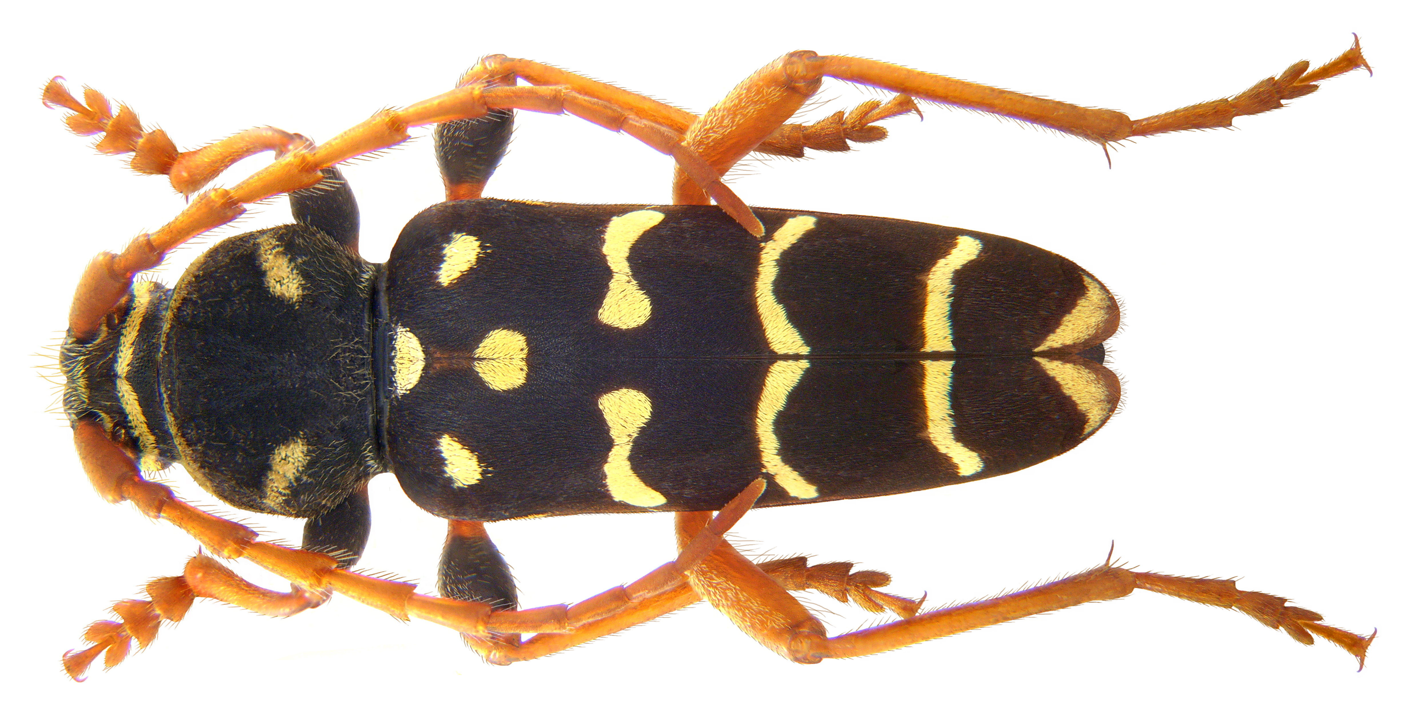 Familie: Cerambycidae Groesse: 11 mm Verbreitung: Europa, Nordafrika Ökologie: Entwicklung in Laubholz, besonders in Quercus Fundort: Germania, Bayern, Oberfranken, Kasendorf leg.det. U.Schmidt, 1972 Photo: U.Schmidt, 2009